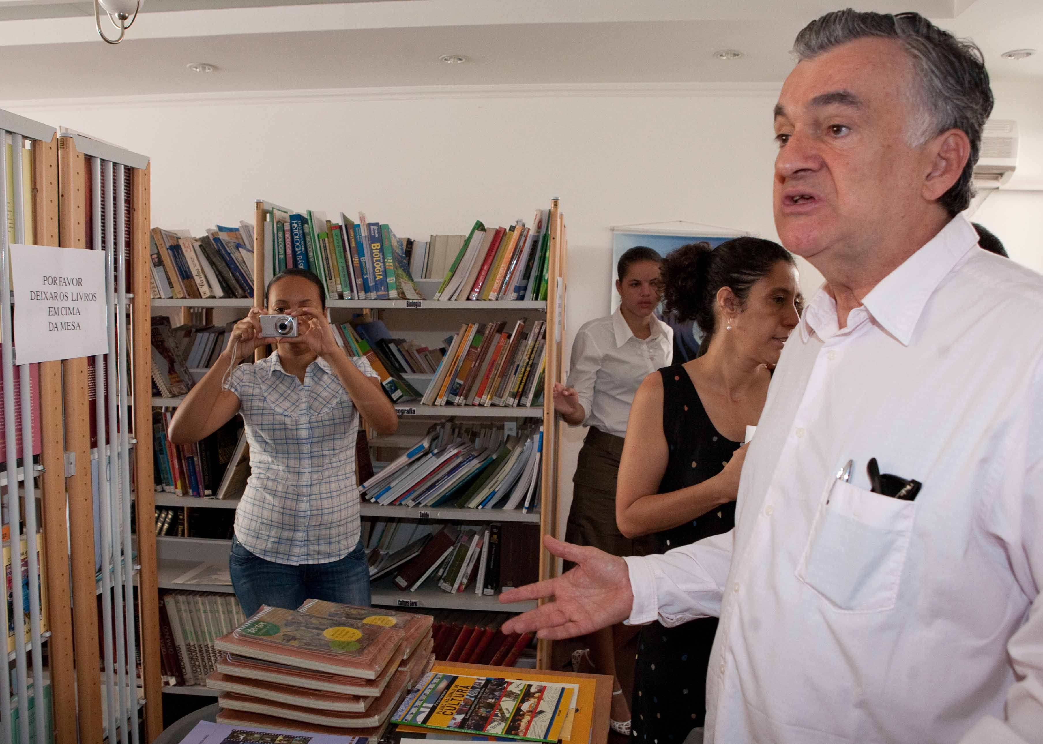 Ministro da Cultura do Brasil, Juca Ferreira, visitou o Centro Cultural Brasil em Cabo Verde